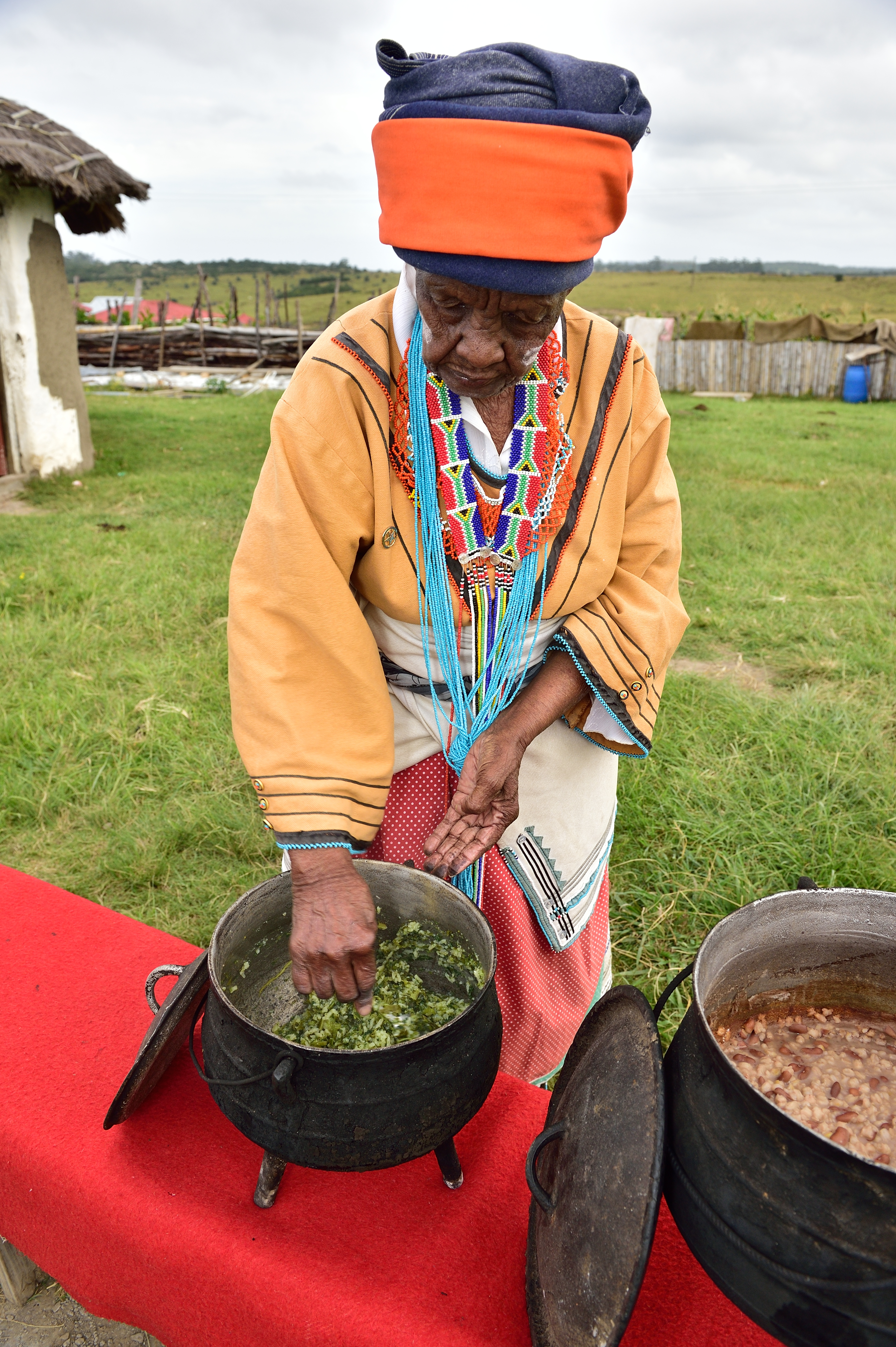 Vue de l'Eastern Cape en Afrique du Sud.